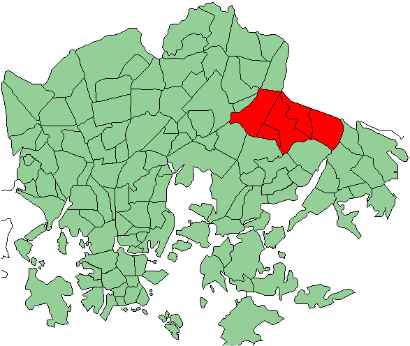 Districts of Helsinki, Mellunkylä district highlighted (in Finnish: Mellunkylän peruspiiri korostettuna)